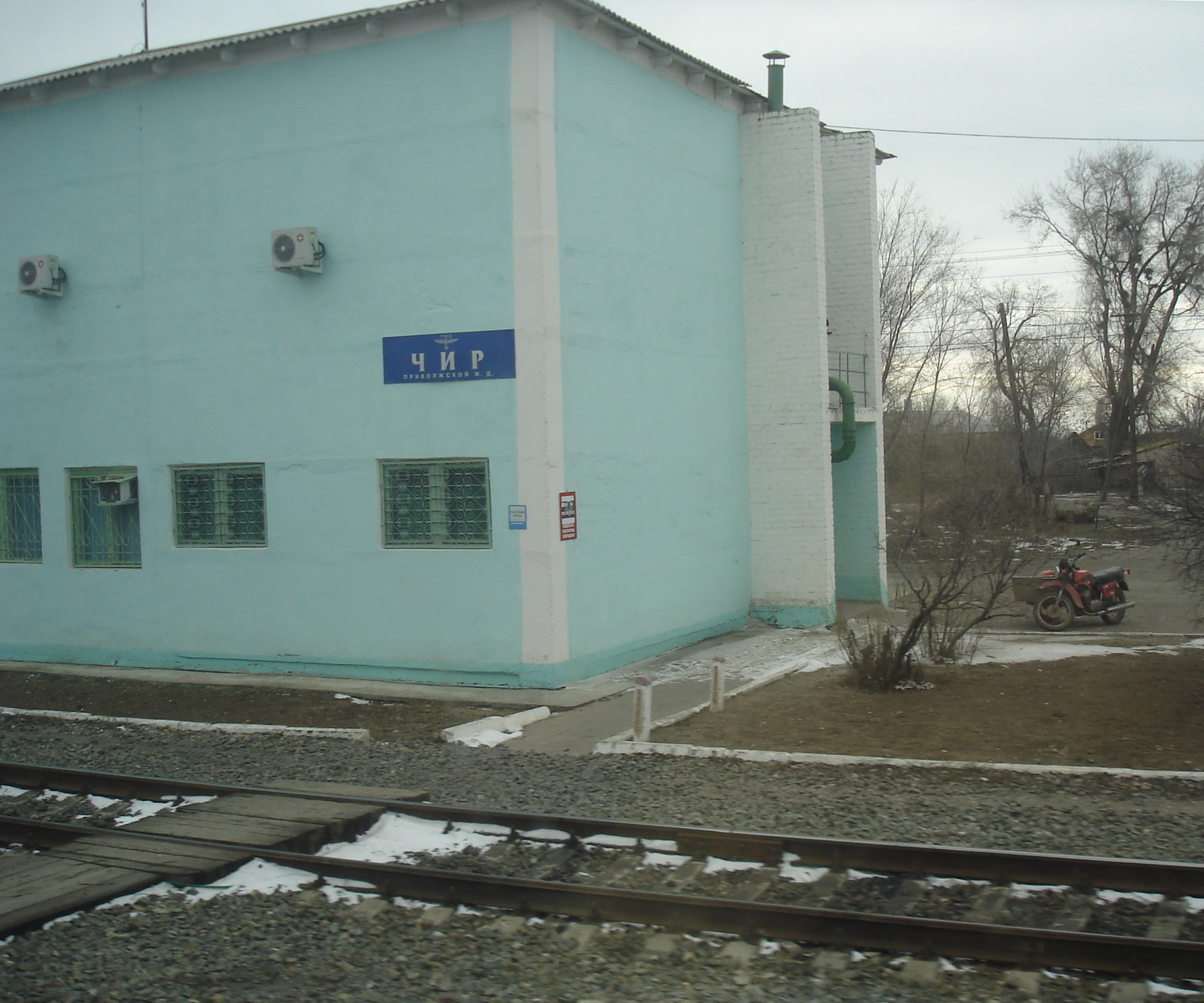 Станционное здание на ЖД-станции Чир